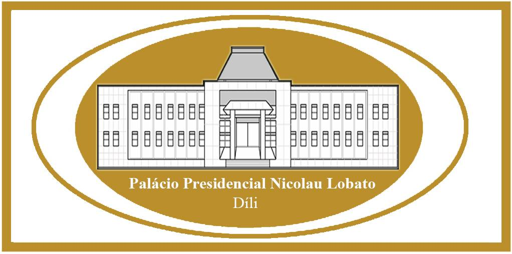 Logomarca do Palácio Presidencial de Timor-Leste.